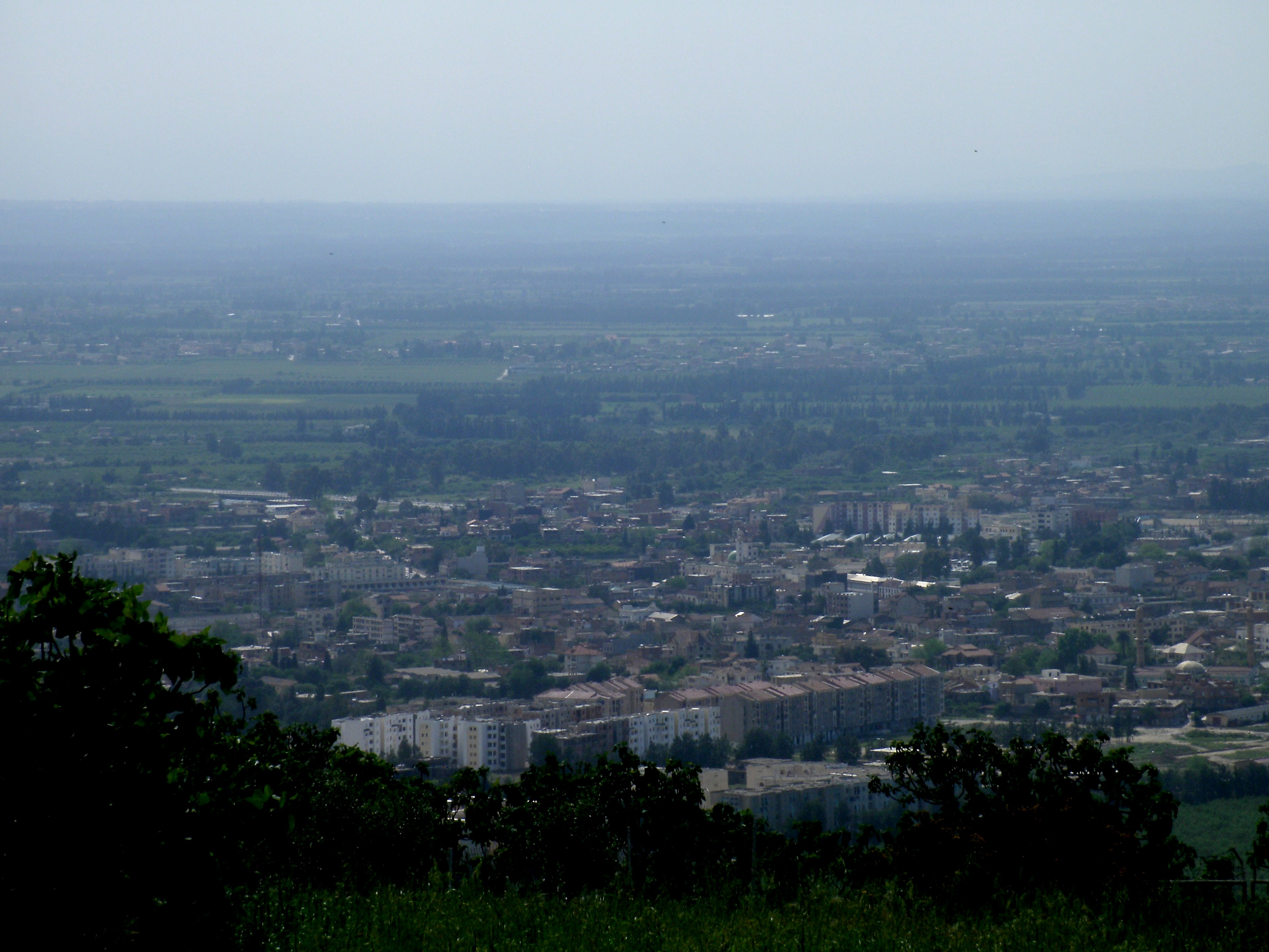 Larbaâ dans la Mitidja